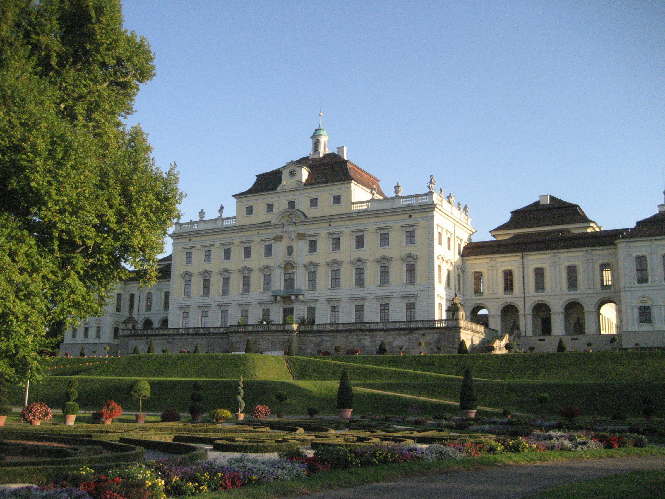 Residenzschloss Ludwigsburg